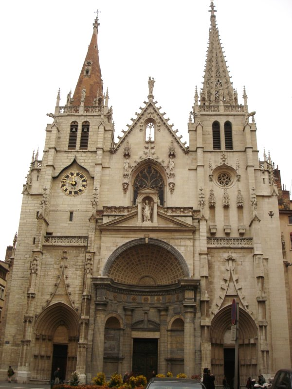 Façade de l'église Saint-Nizier, Lyon, IIe arrondissement.